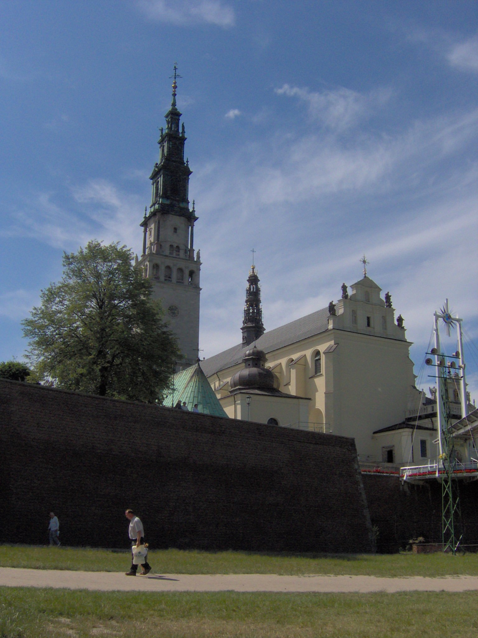 Bazylika Jasnogórska